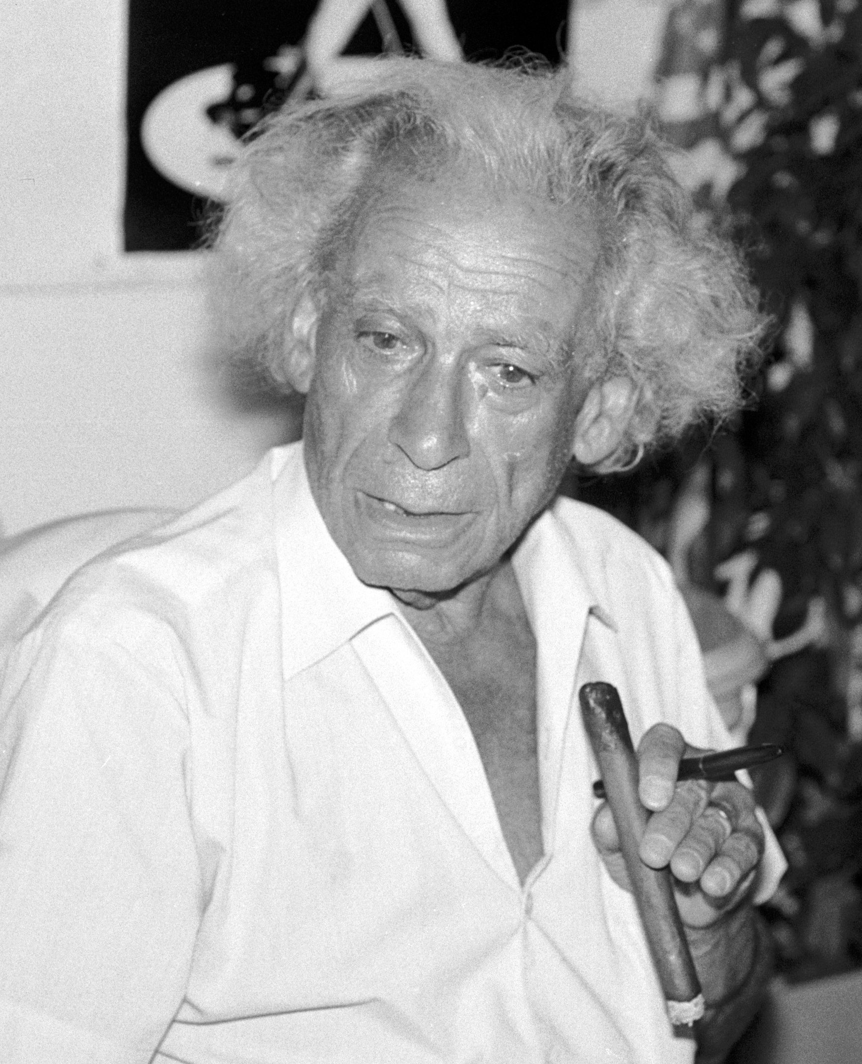 Le cinéaste américain Samuel Fuller à Deauville (Normandie, France) en 1987.